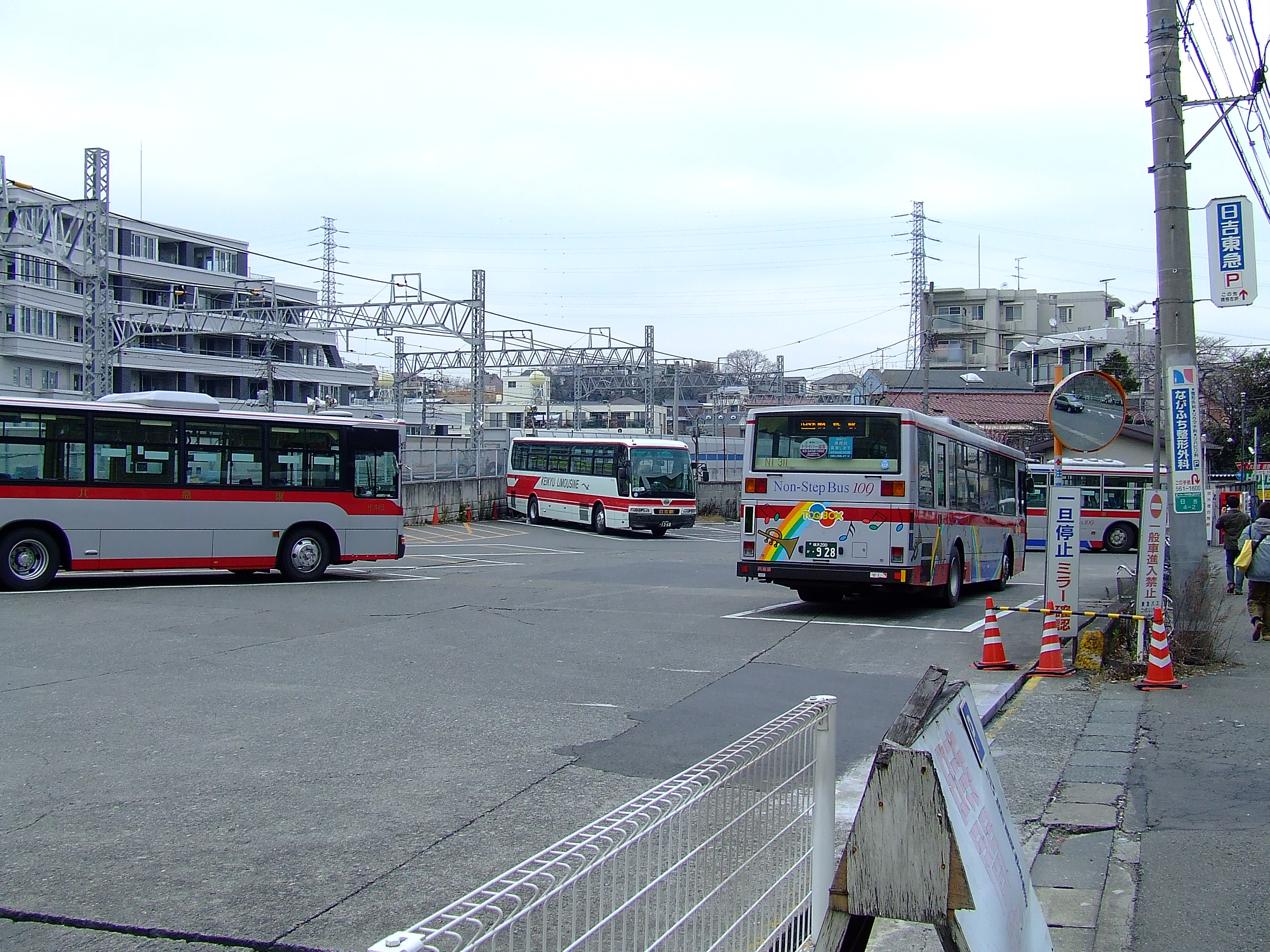 日吉駅付近にあるバス待機場（元東急バス日吉営業所）